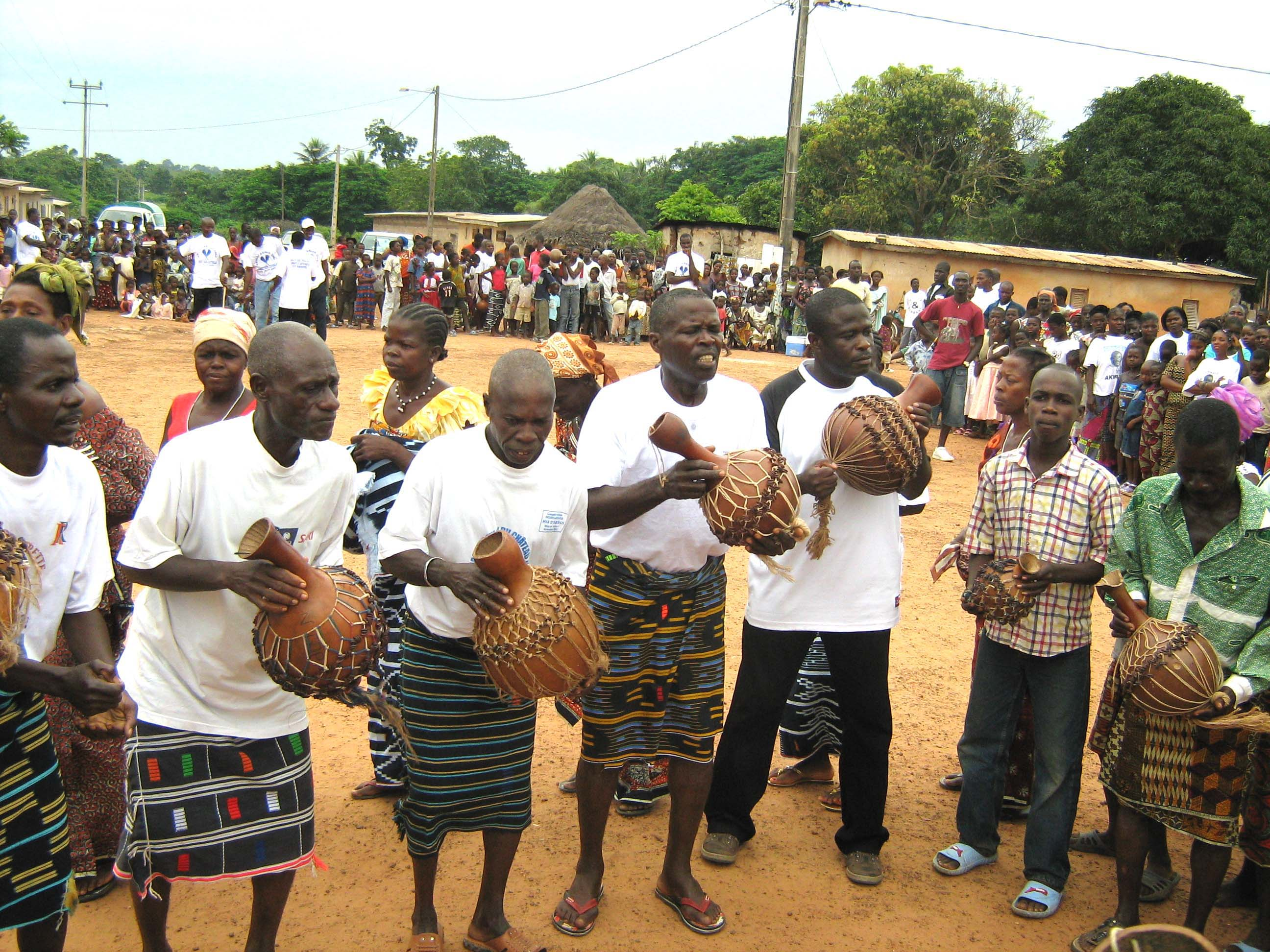 Image en format jpeg